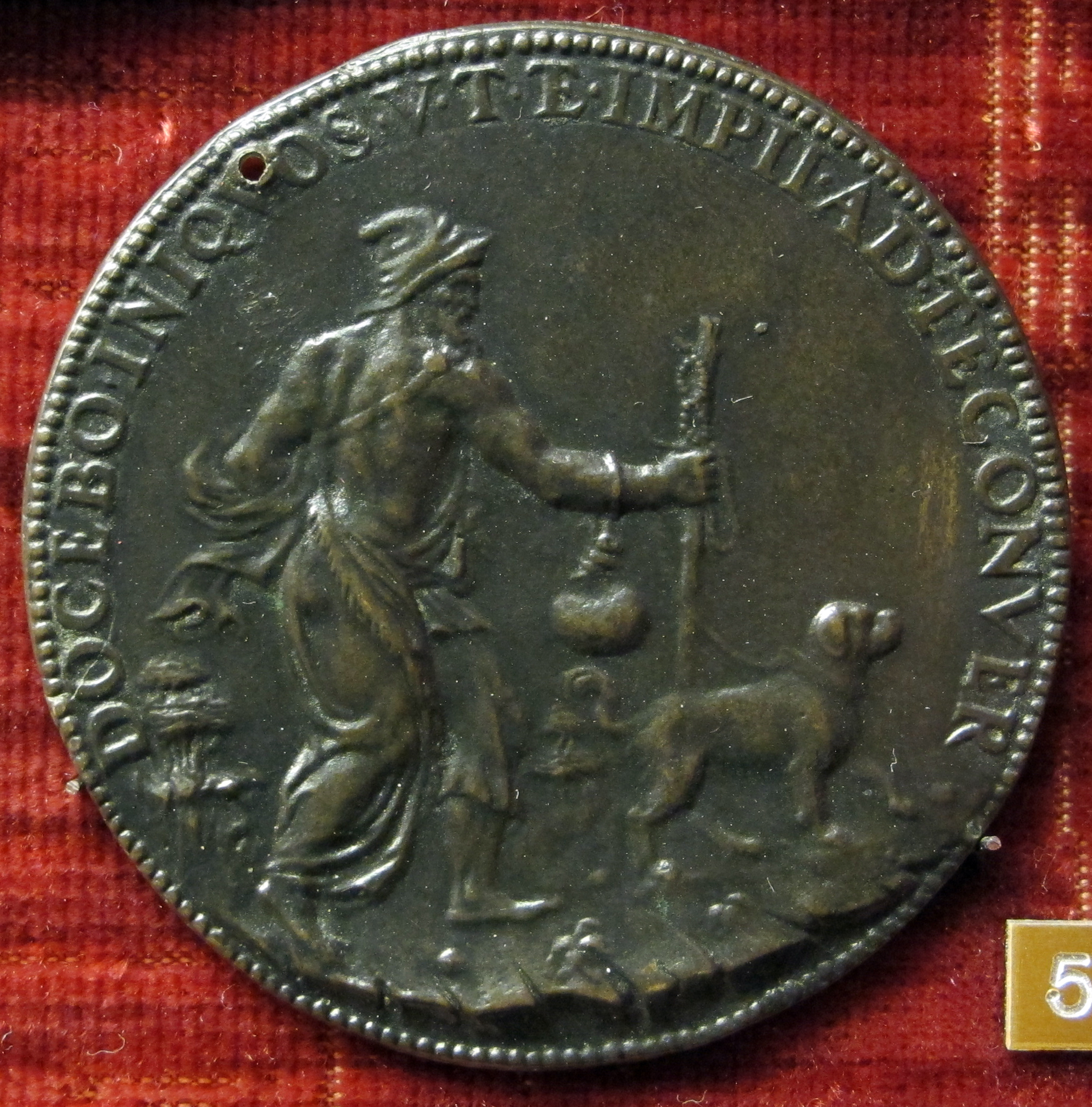 Leone leoni, medaglia di bronzo di michelangelo buonarroti, verso